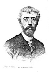 Self-portrait